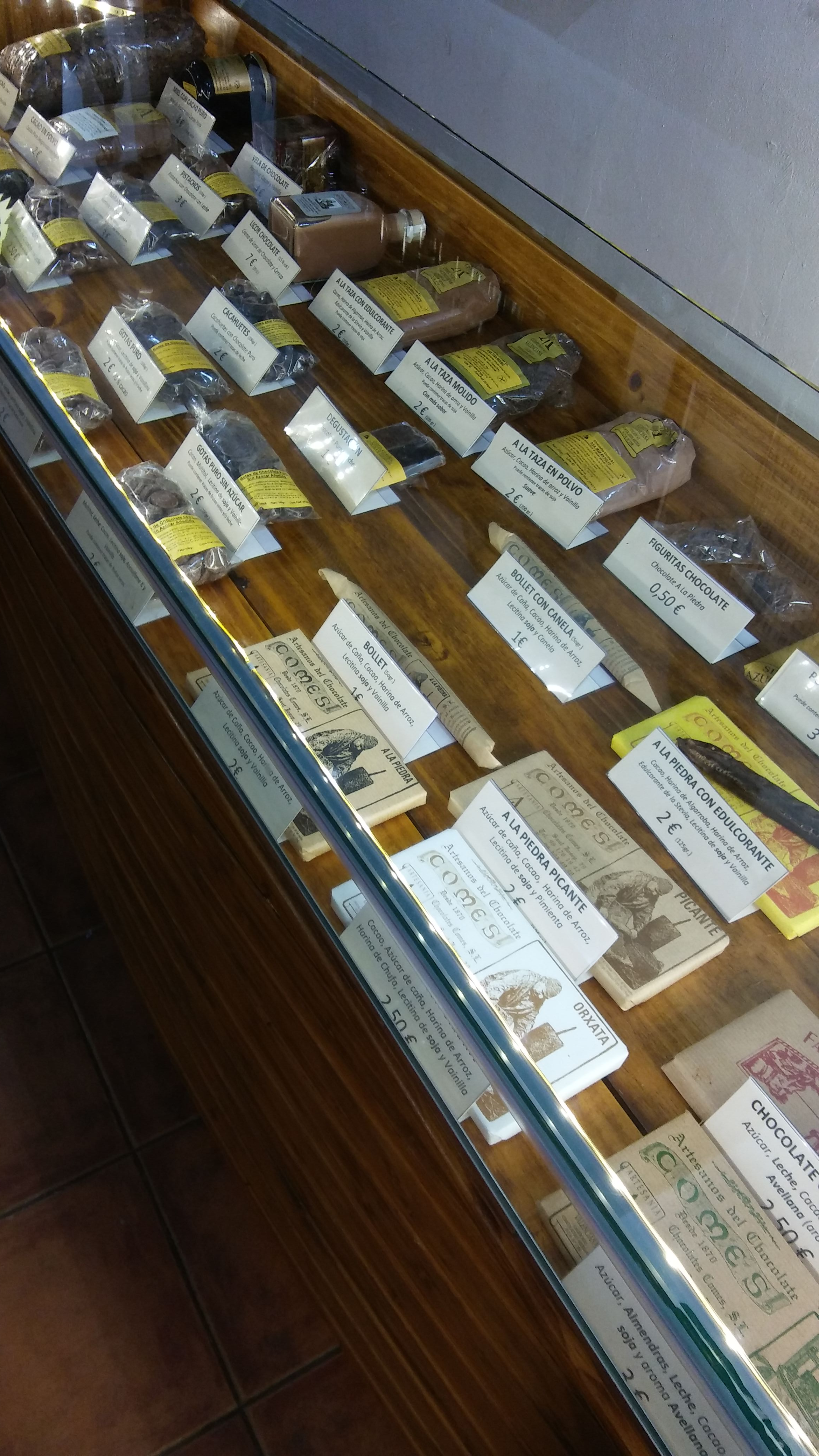 Tienda de productos Museo del Chocolate de Sueca